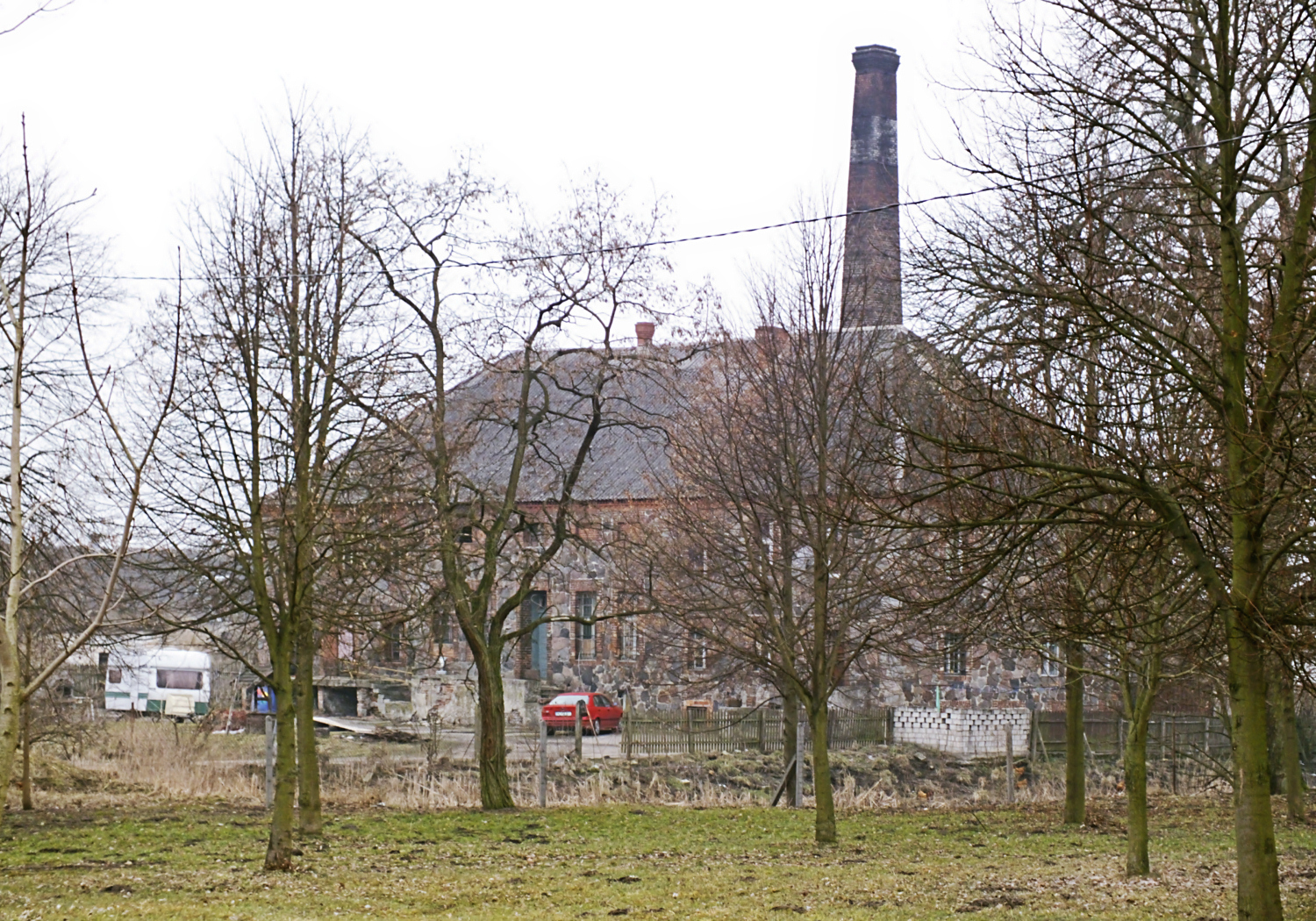 Zabudowania folwarku w Wyszynach; Wyszyny, Gmina Budzyń